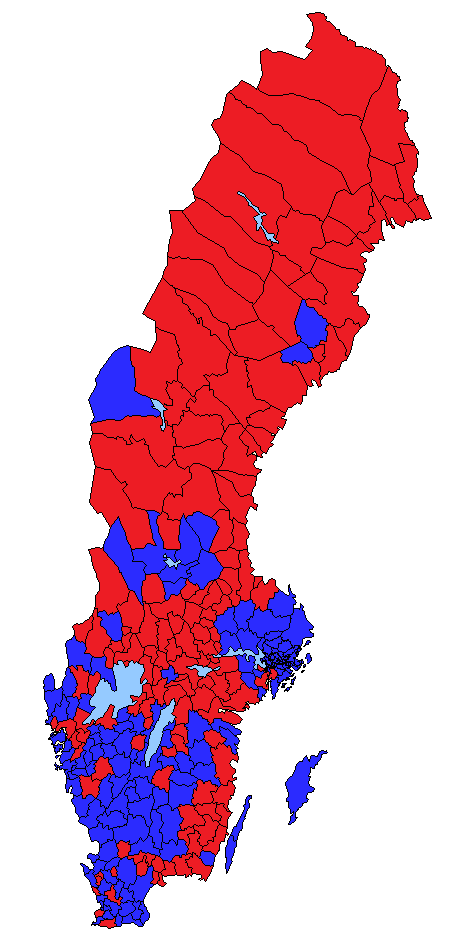 Riksdagsvalet 2006 kommunvis